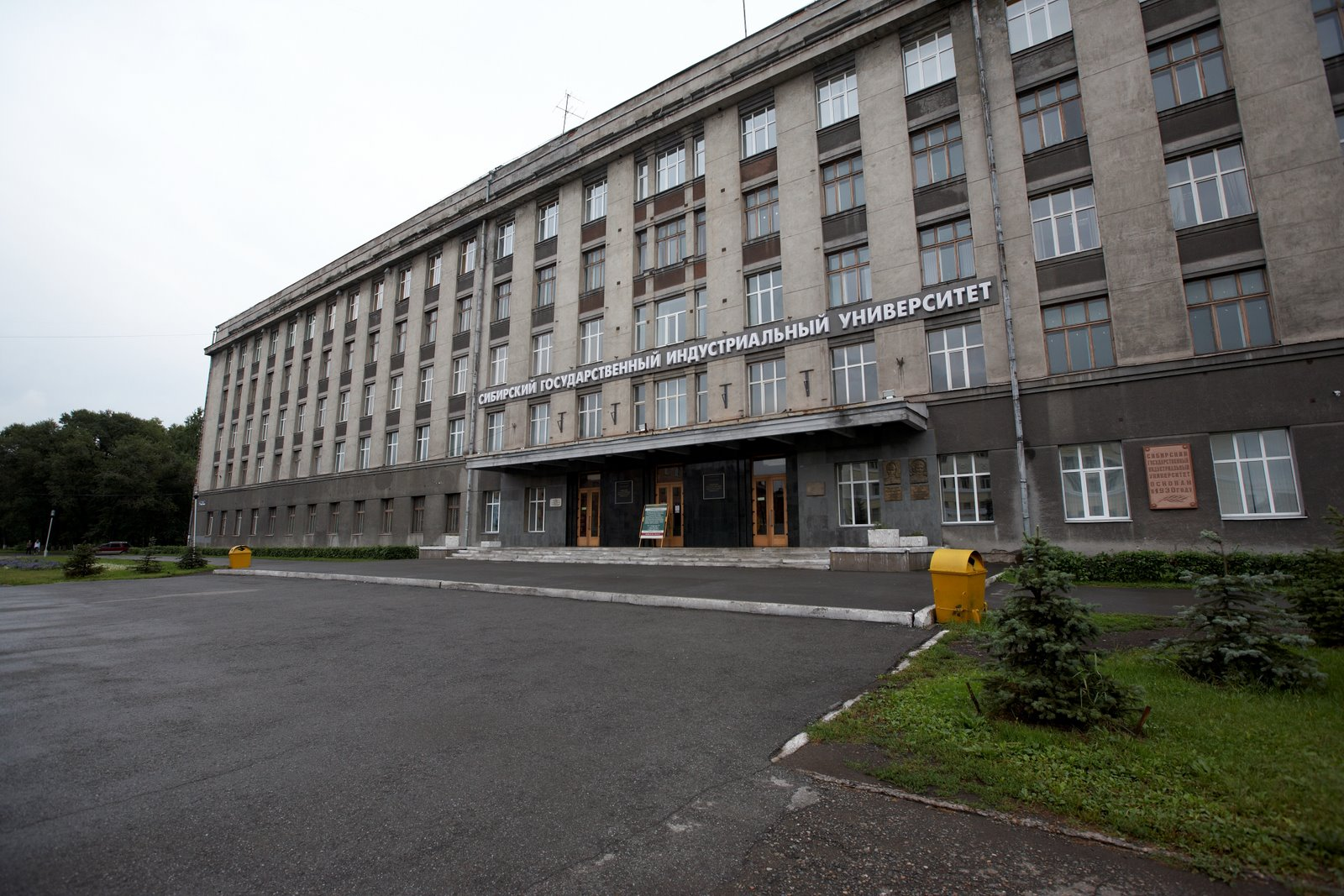 Novokuznetsk